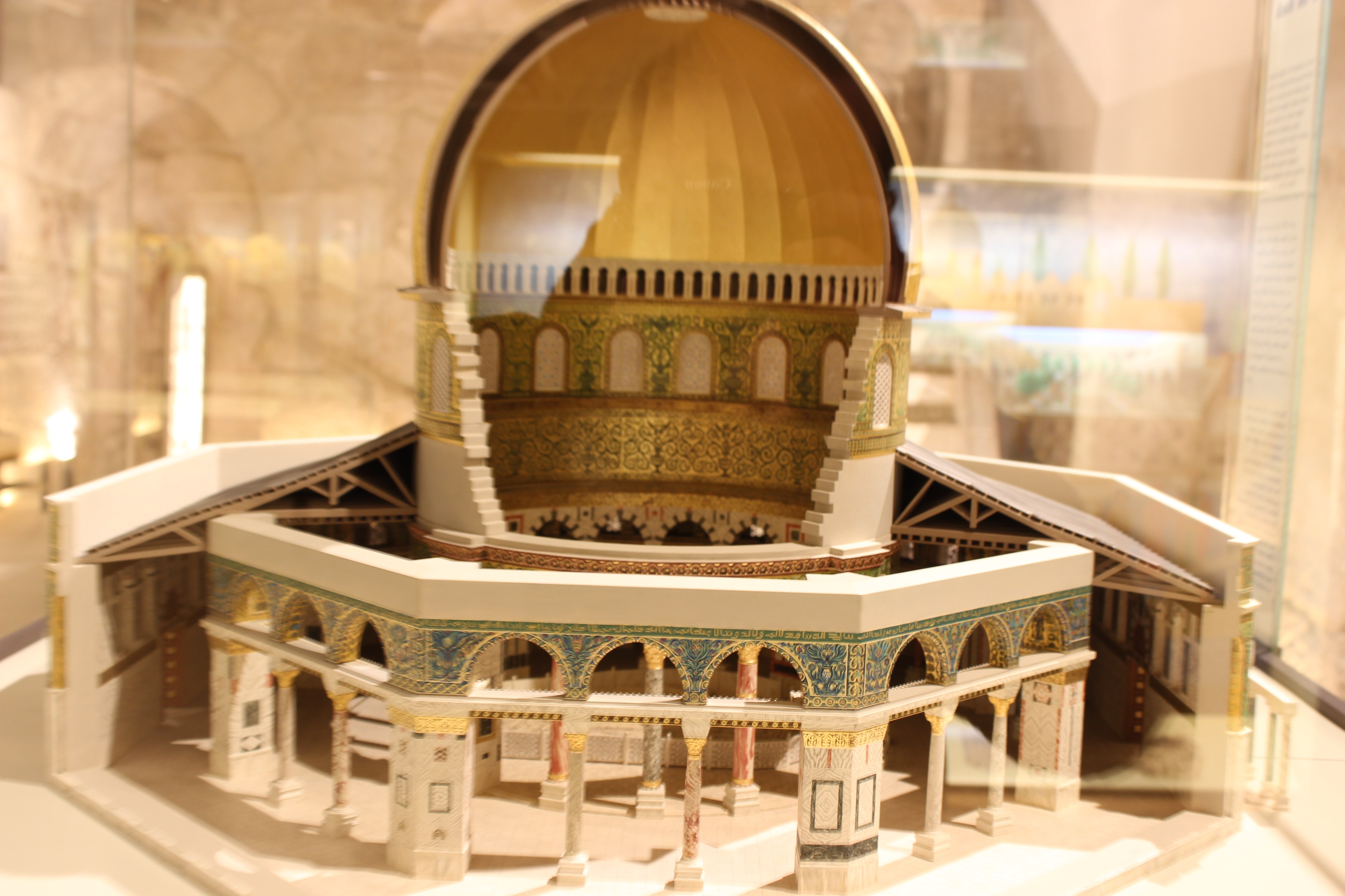 Jerusalem